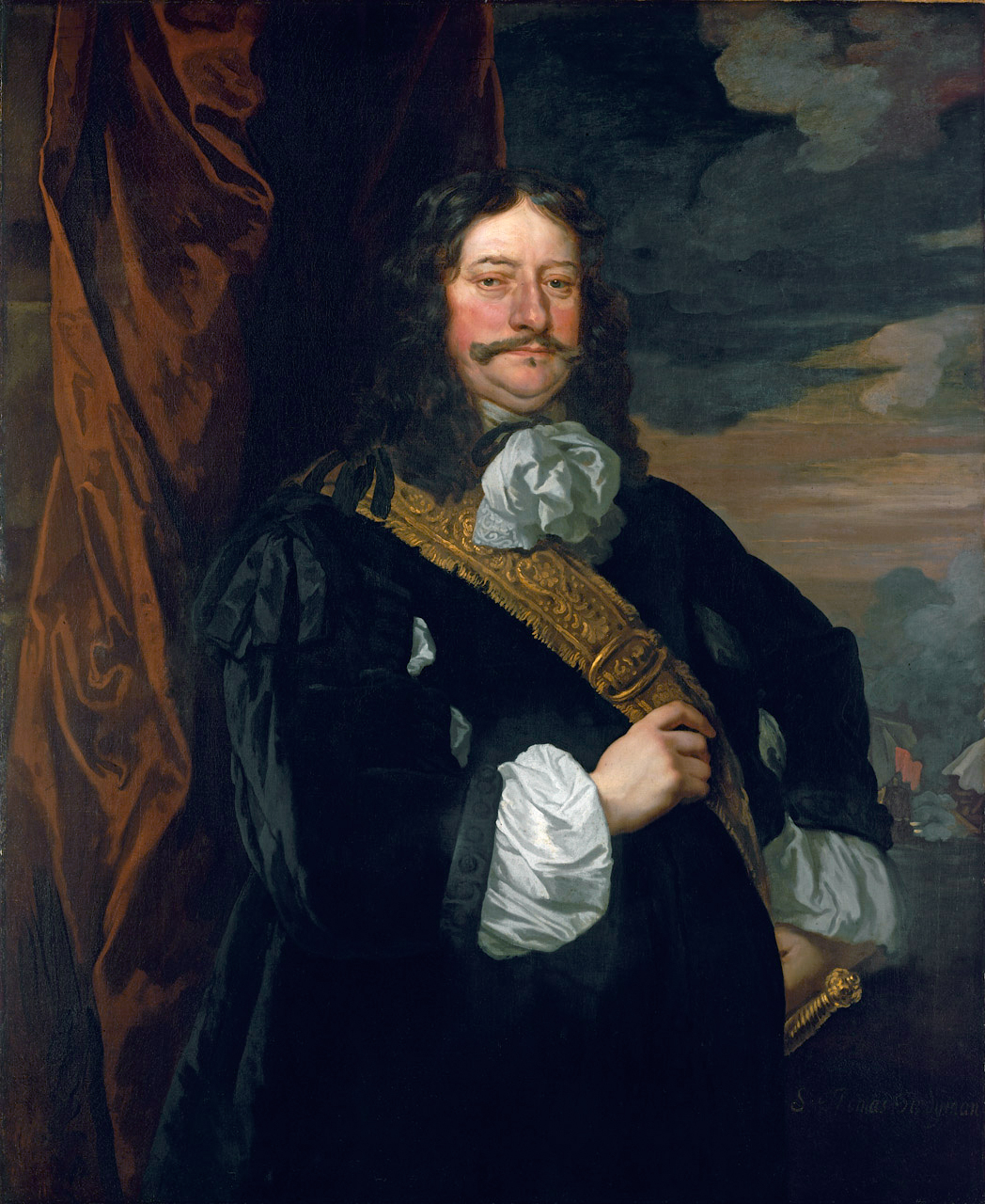 Rearadmiral Sir Thomas Teddiman